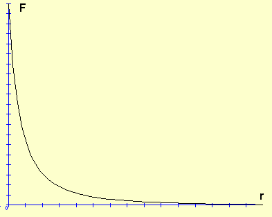 Gráfico de ariación de la fuerza entre cargas eléctricas en función de la distancia A force inversely proportional to distance, as the Coulomb force between a point charge and a line charge.